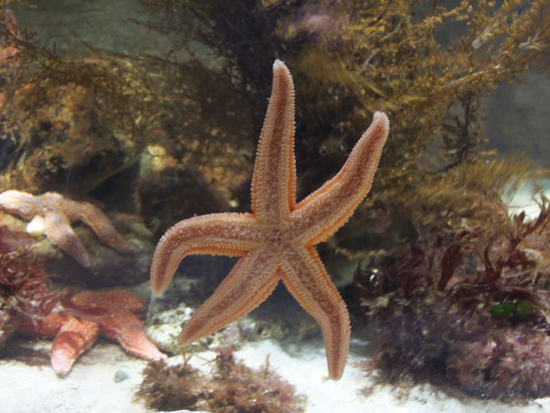 Photographie d'une étoile de mer commune (Asterias rubens) à l'Aquarium de La Rochelle.